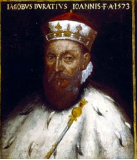 Dipinto del doge Giacomo Grimaldi Durazzo